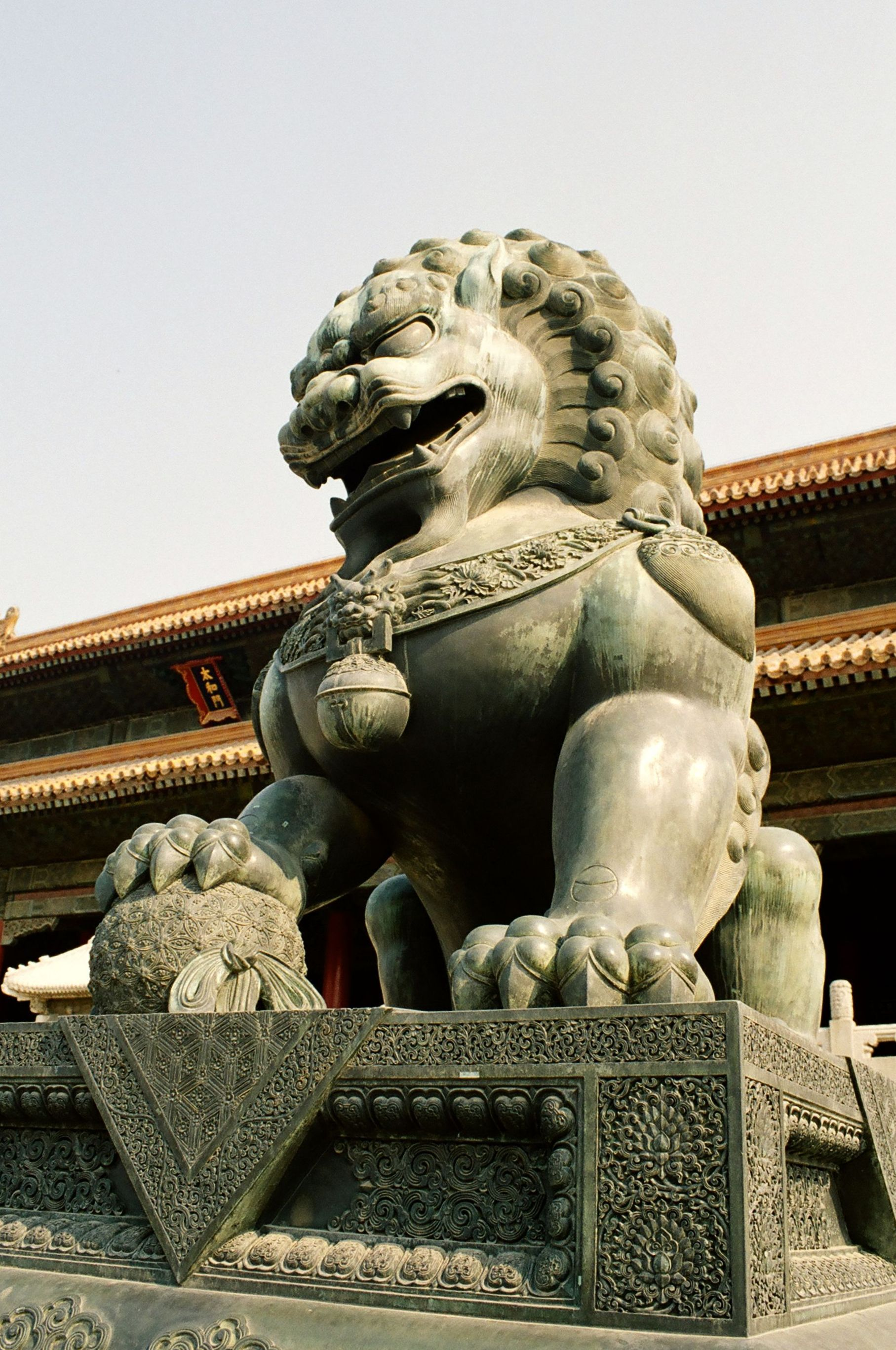 Zijincheng (Forbidden City), Beijing